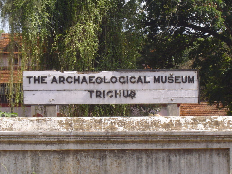 തൃശ്ശൂർ പുരാവസ്തു മ്യൂസിയത്തിന്റെ പ്രവേശന കവാടത്തിൽ പ്രതിഷ്ഠിച്ചിരുന്ന നാമ ഫലകം (ശരിക്കും ഒരു പുരാവസ്തു തന്നെ അല്ലേ.. ഹി ഹി)